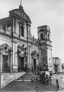 Reggio Calabria - Antica cartolina raffigurante la vecchia cattedrale di Reggio Calabria, distrutta dal terremoto. - old postcard